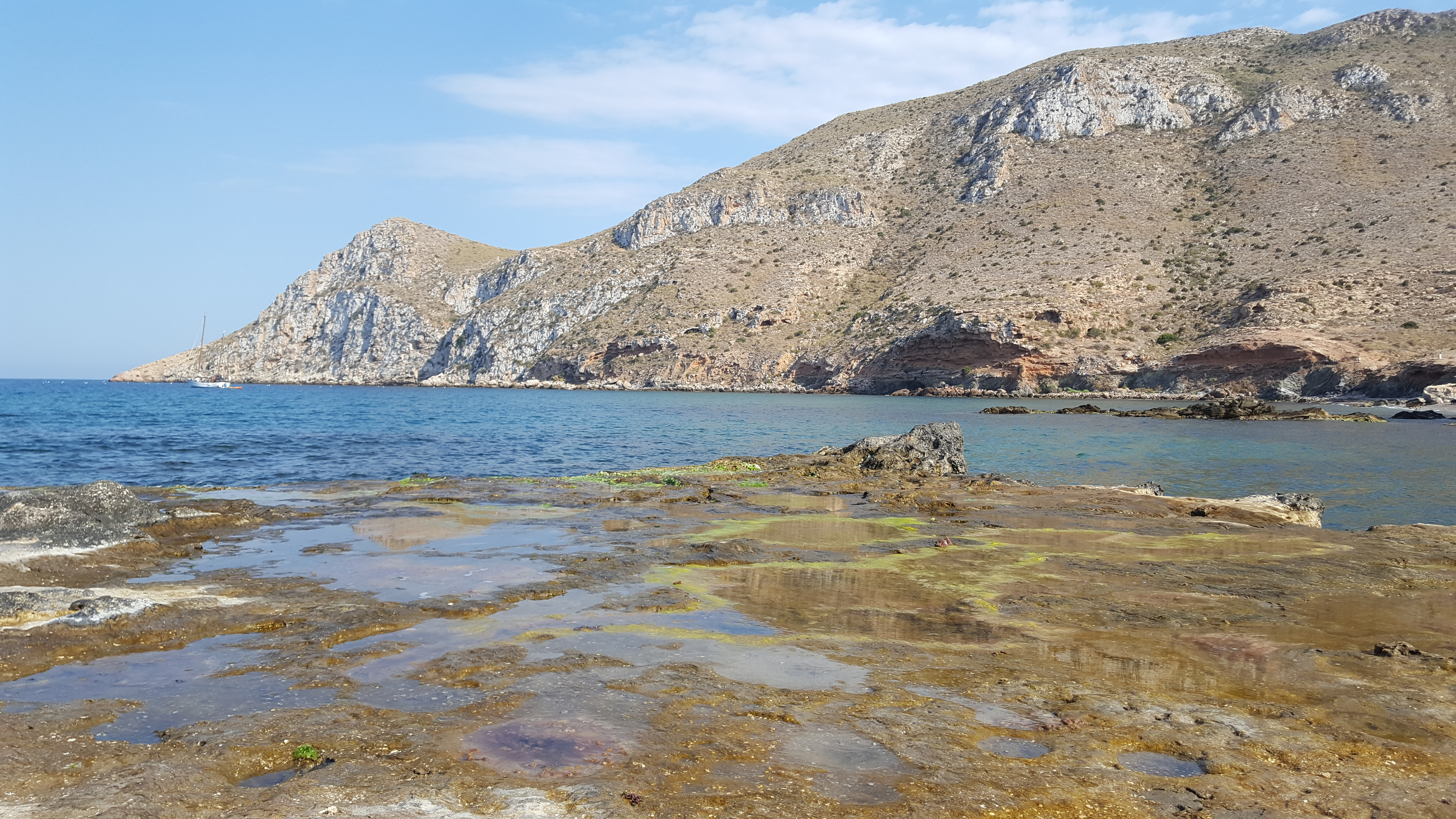 Vista de Cabo Cope desde la Playa de Cope en la cual se pueden observar los distintos acantilados que hacen de esa playa una zona escarpada y rocosa.